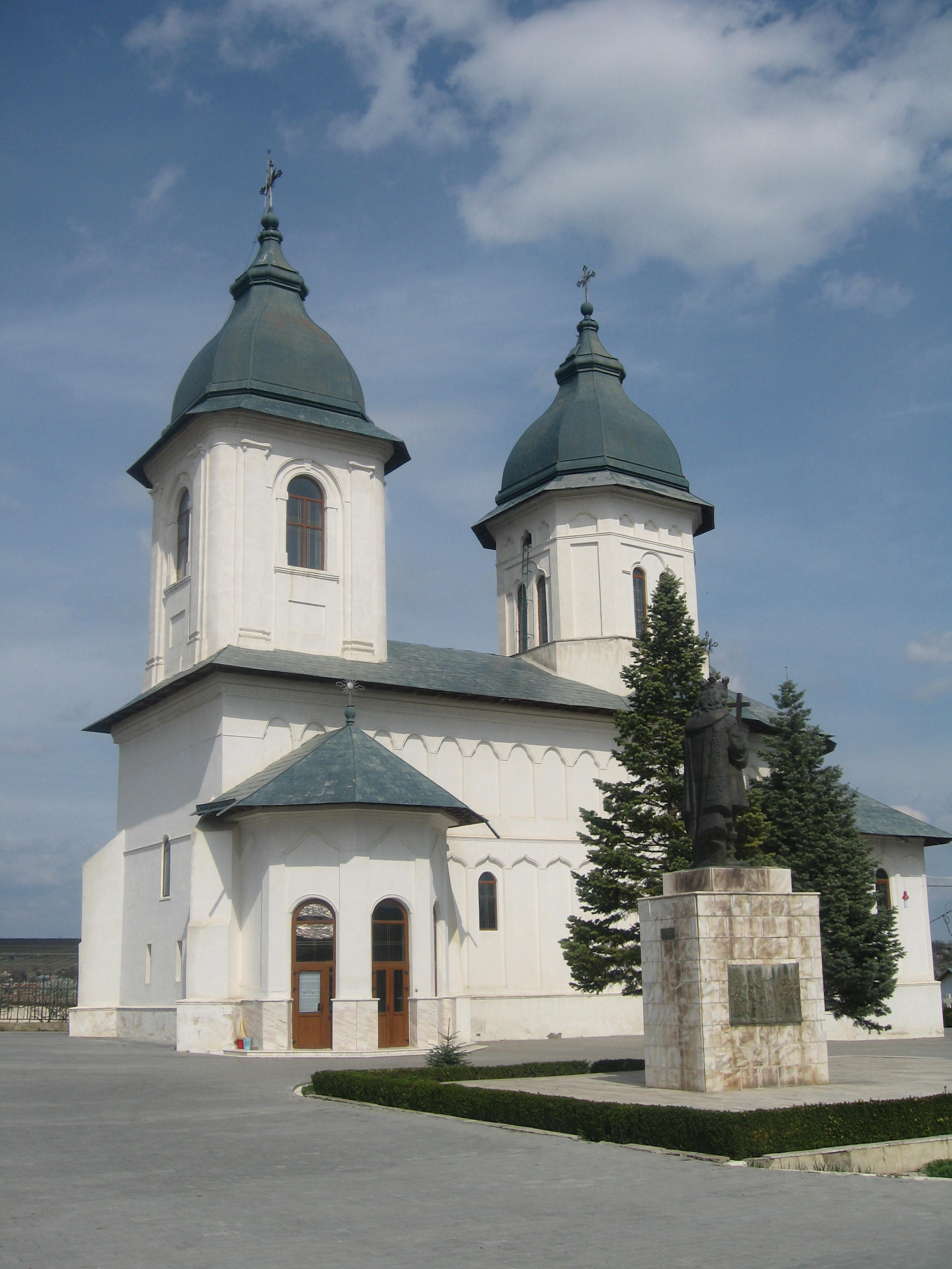 Catedrala din Husi, Vaslui County, Romania 01